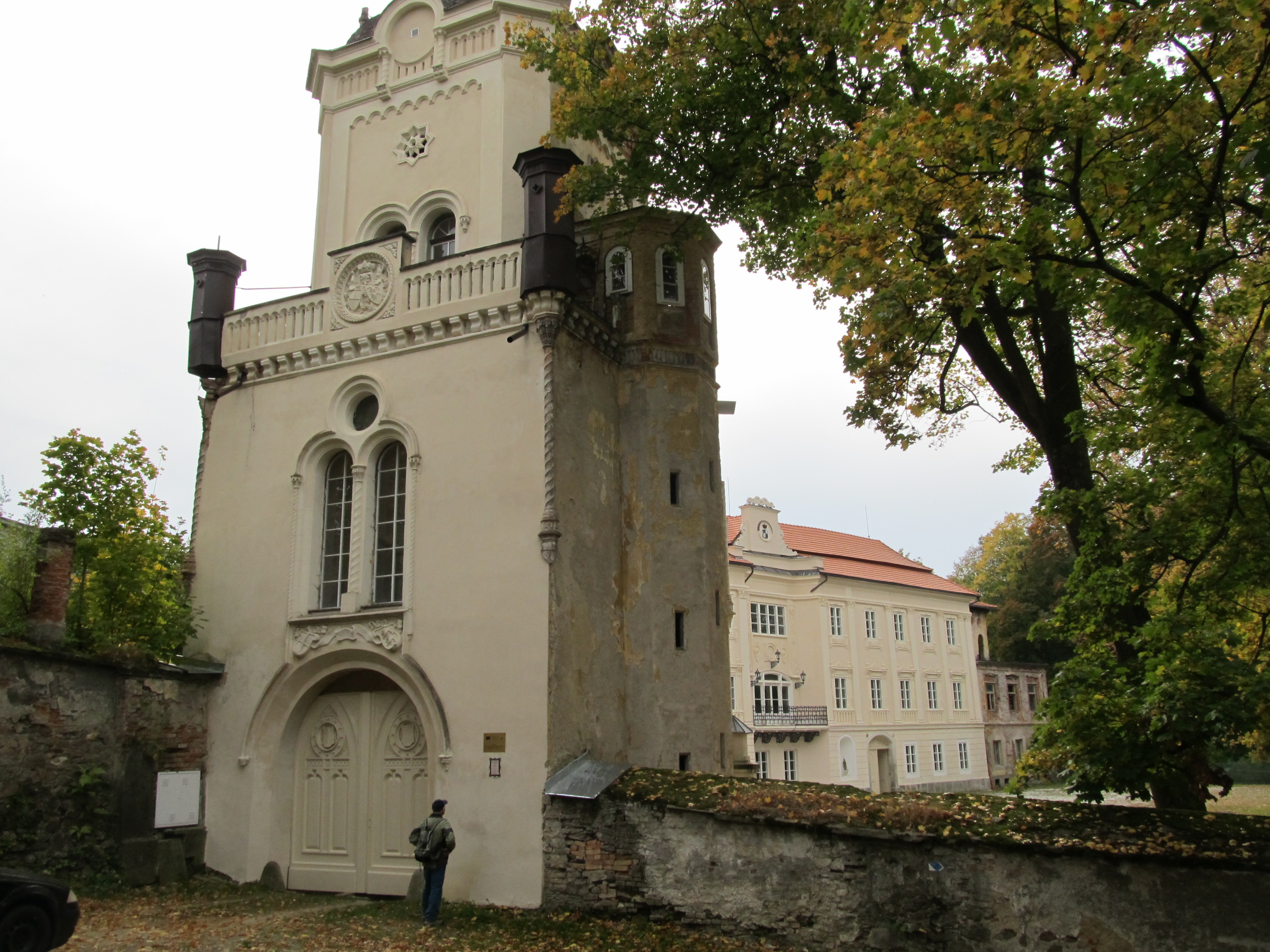 Bystřice nad Úhlavou - zámecká brána